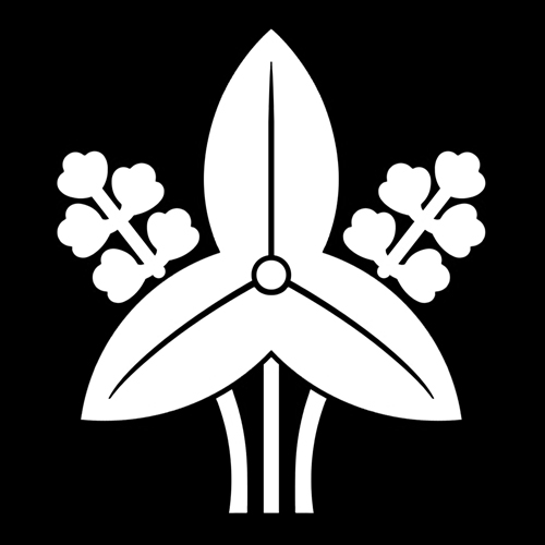 「立澤瀉」紋（染抜）